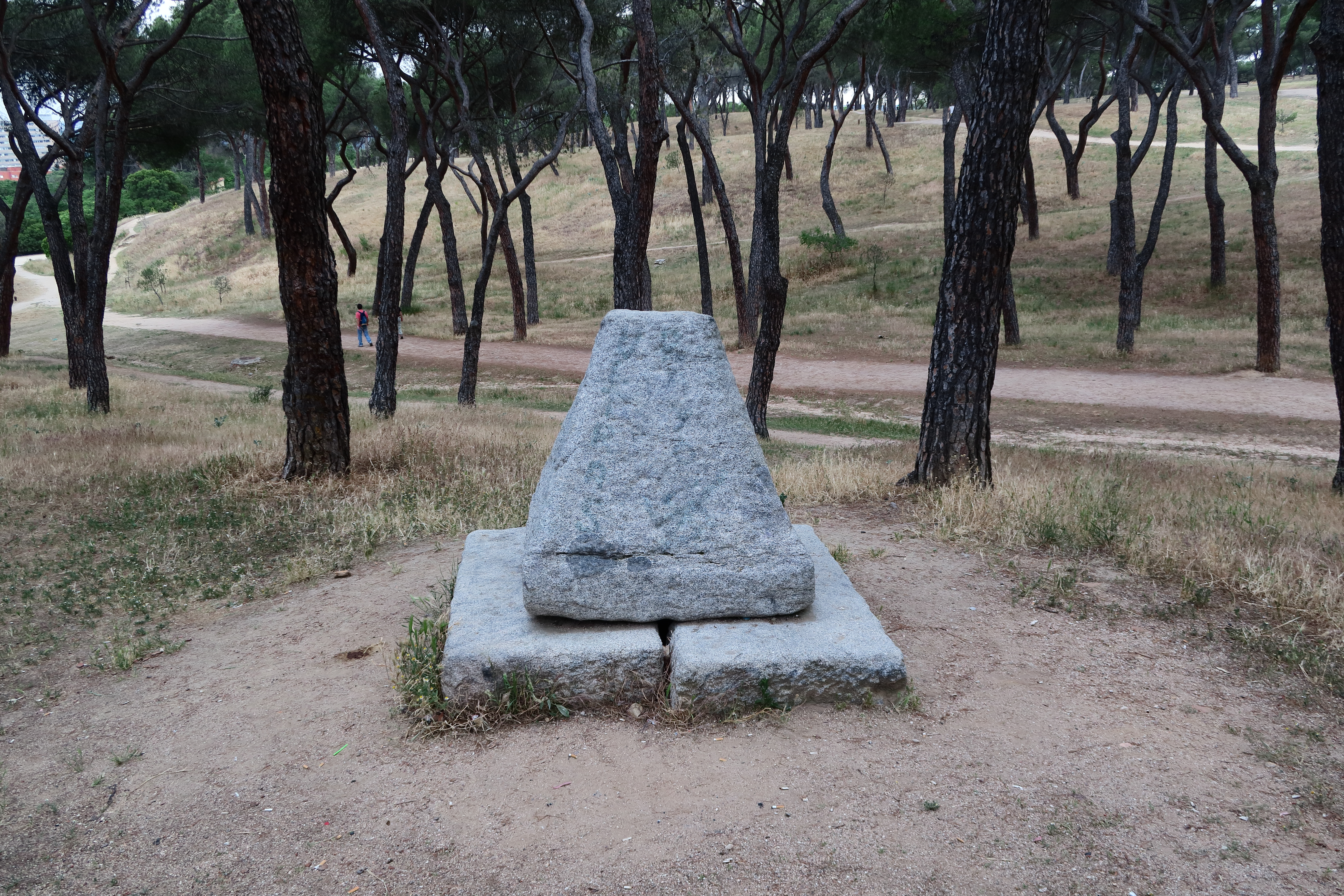 Capirote 02, viajes de agua en el Parque Dehesa de la Villa, 02